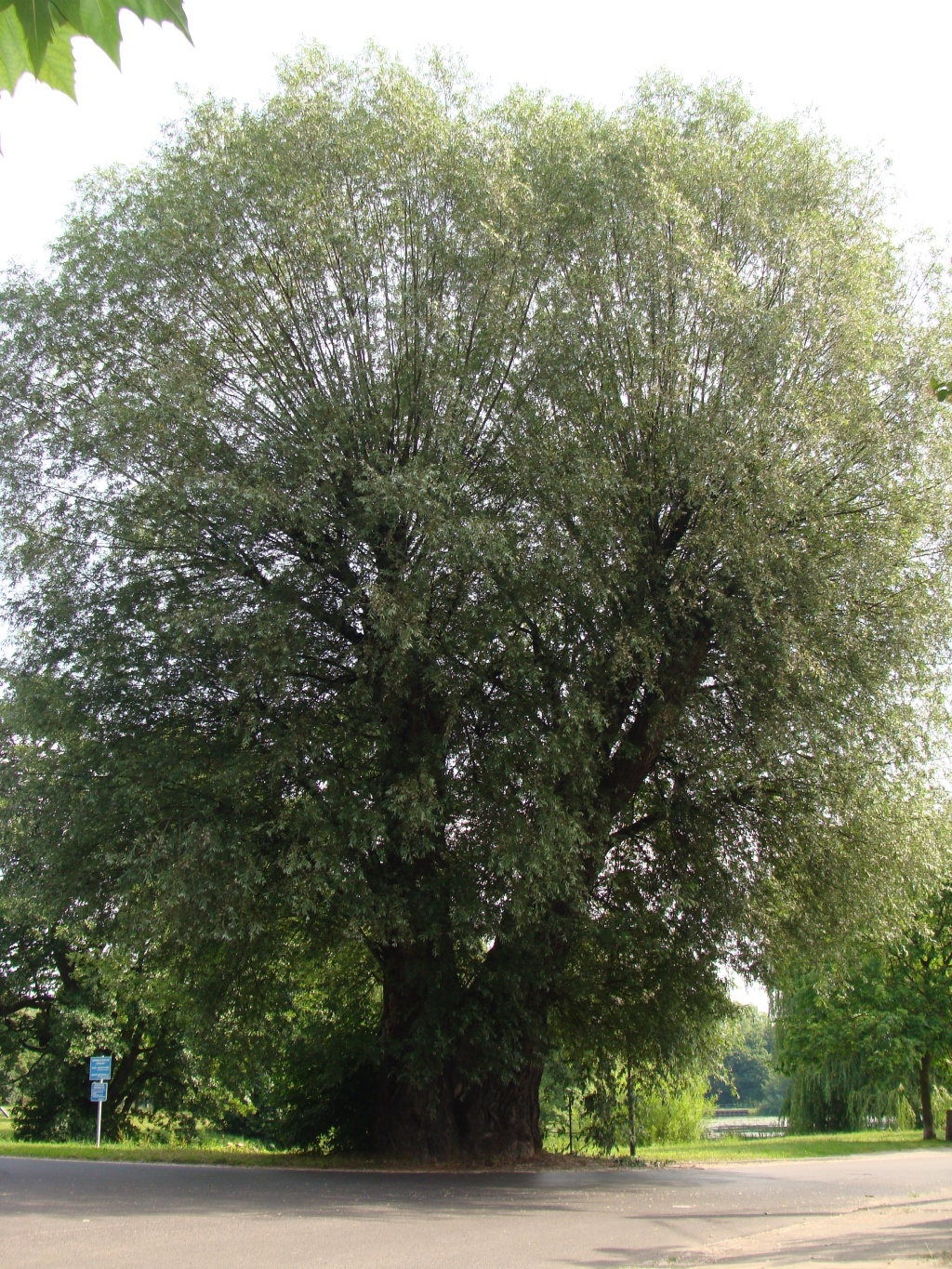 1094. Wierzba biała - pomnik przyrody - róg ul. Subisława i Beniowskiego. Obwód drzewa w 2014 roku wynosił 760 cm.